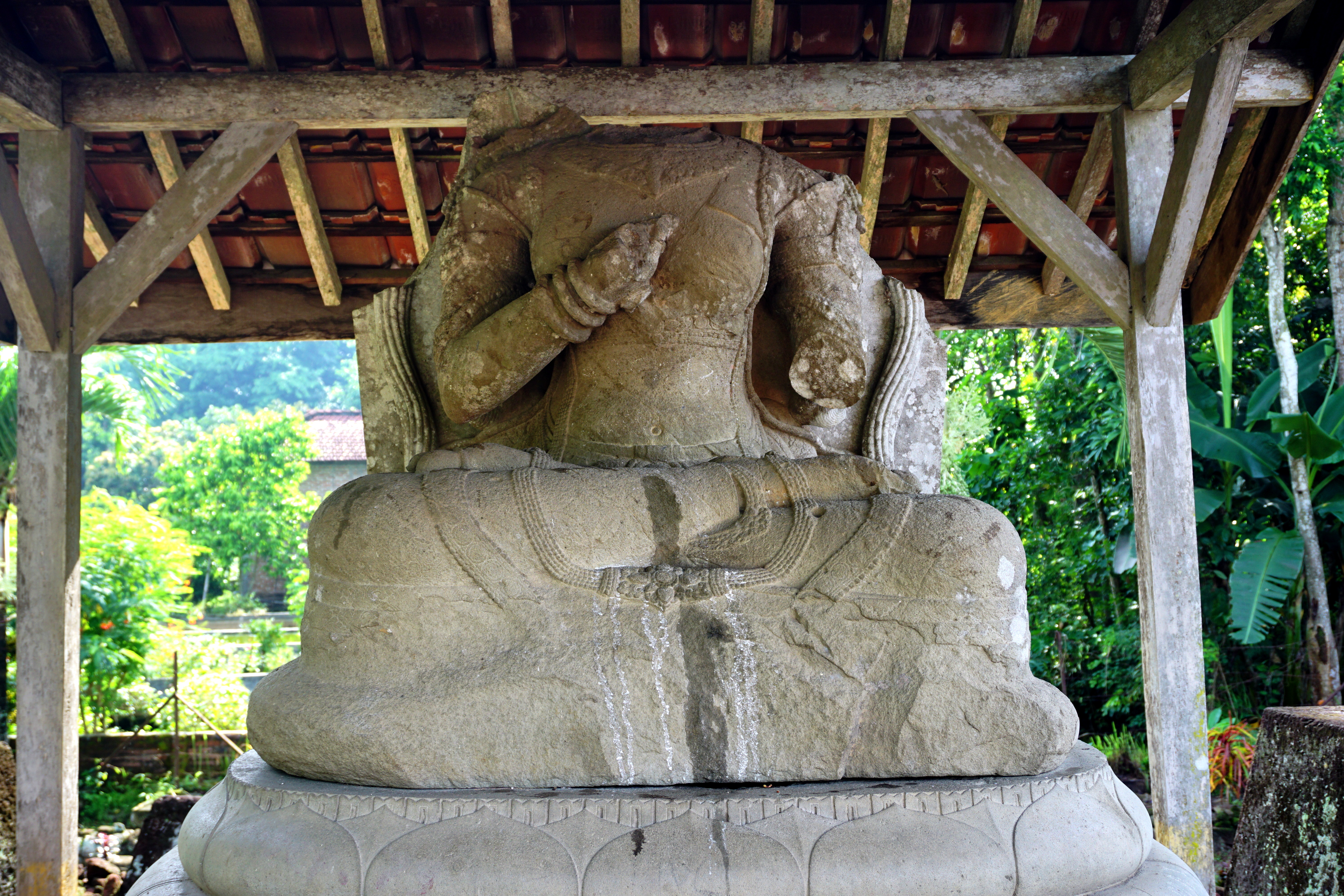 Blitar and Tulungagung, East Java